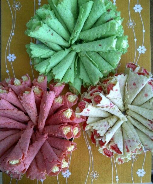 Asan və tez hazırlanan vaflili şirniyyat